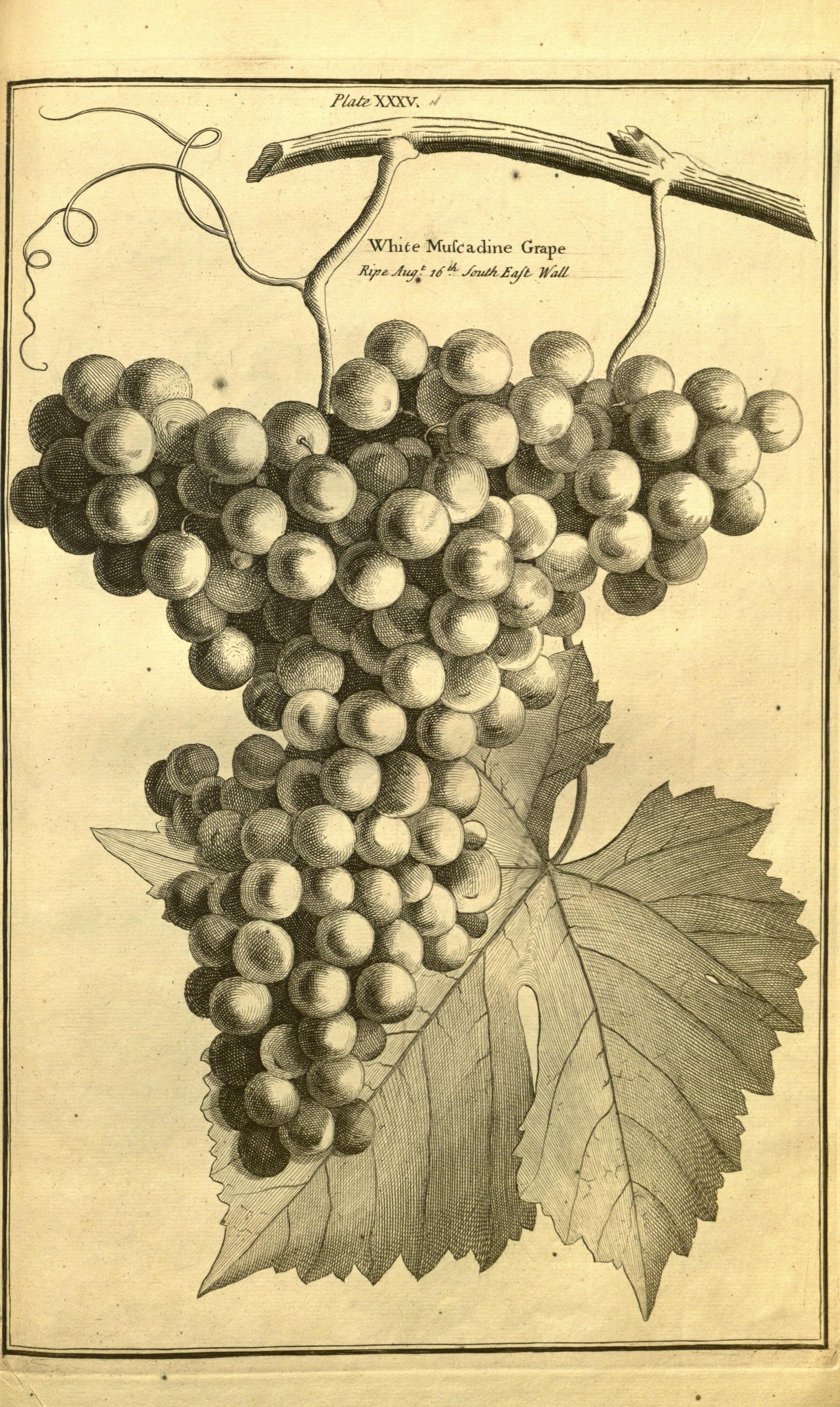 / r ri «